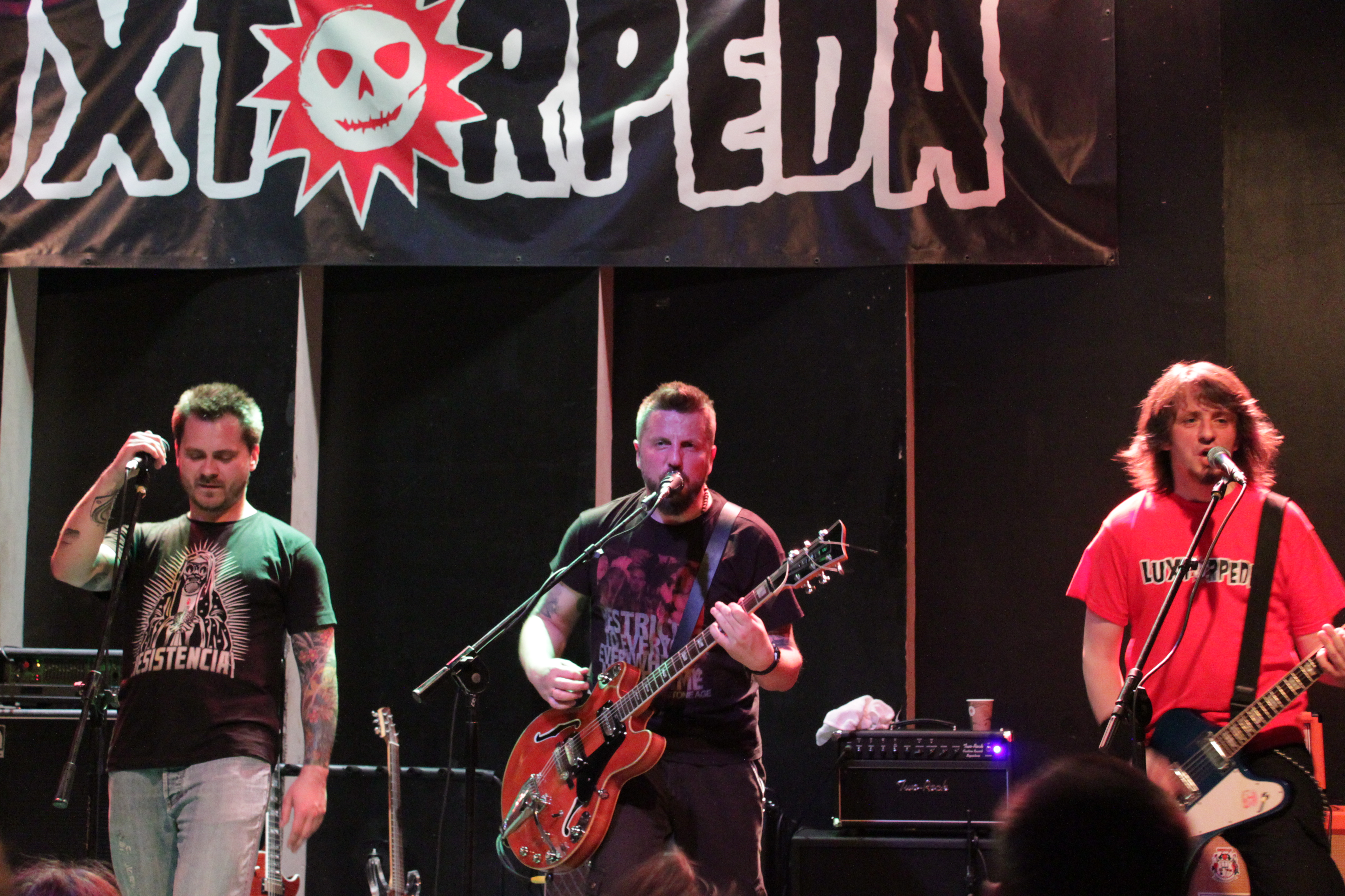 Luxtorpeda w Uchu, Gdynia